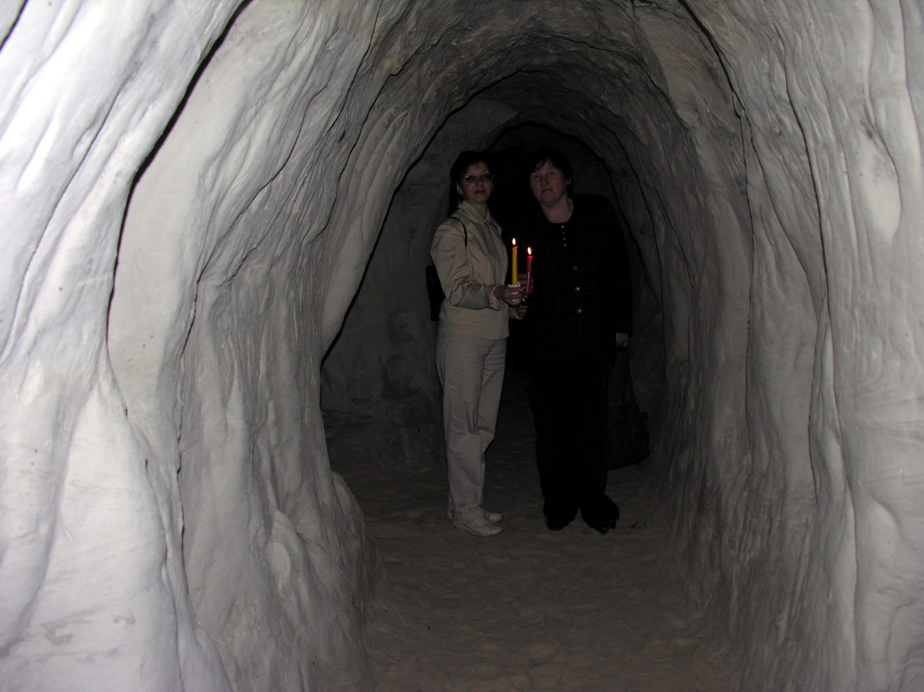 Riežupės ola, labirintų sistema